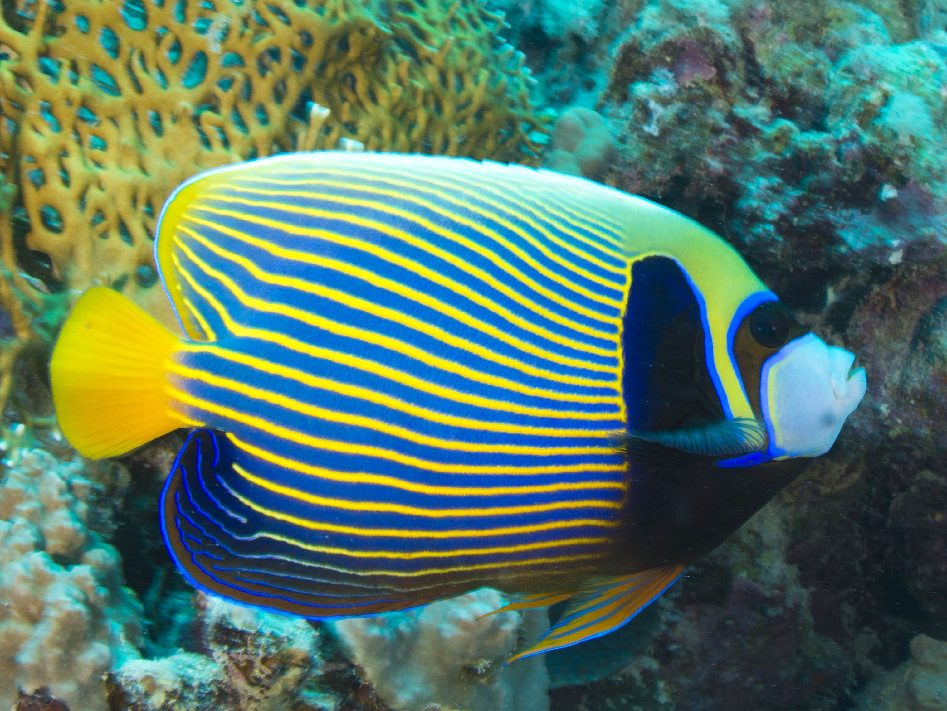 Pomocanthus imperator